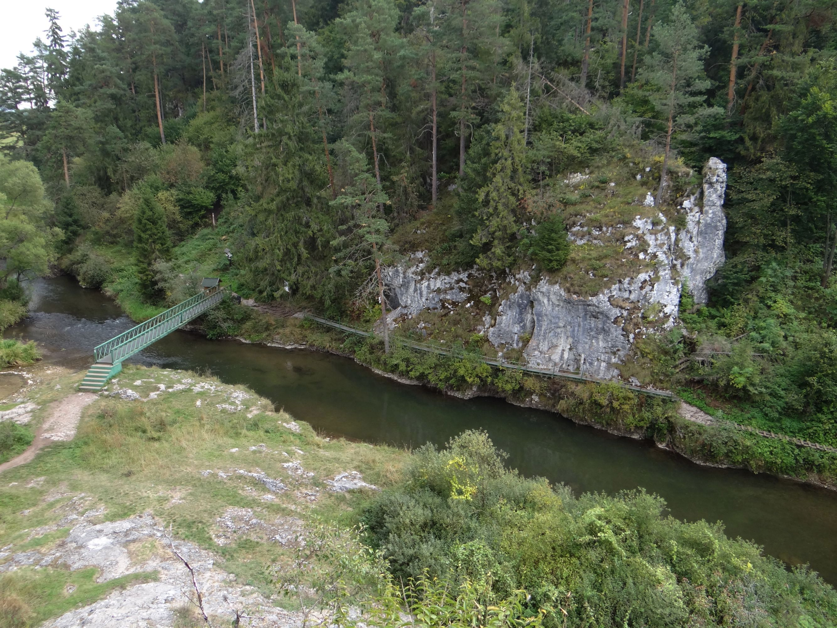 Hornád przy wylocie Przełomu Popradu i ujściu potoku Veľká Biela voda